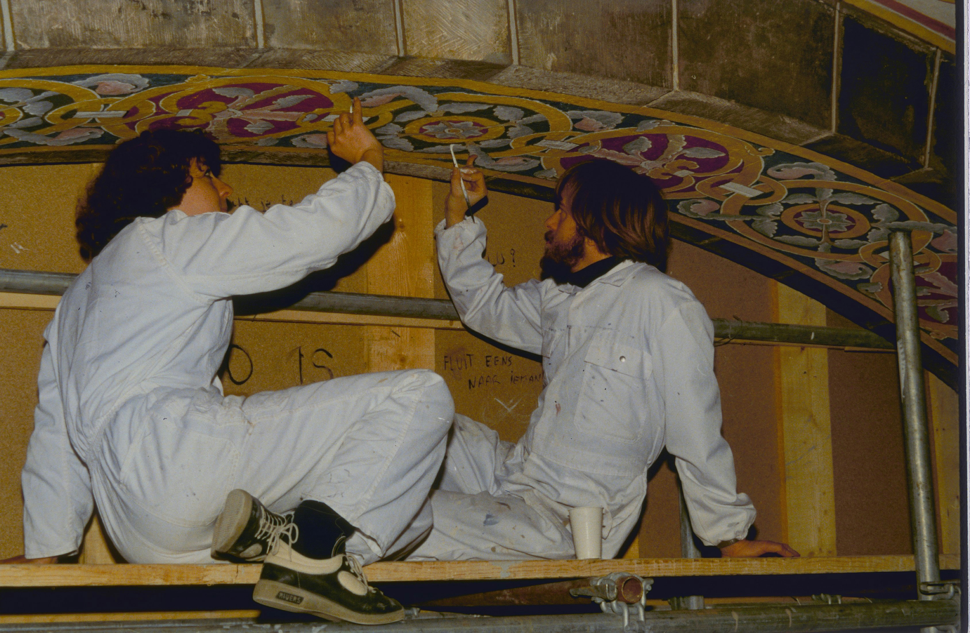 Voormalig Abdij Kloosterrade: Interieur, tijdens restauratie (opmerking: Gefotografeerd voor Monumenten In Nederland Limburg)